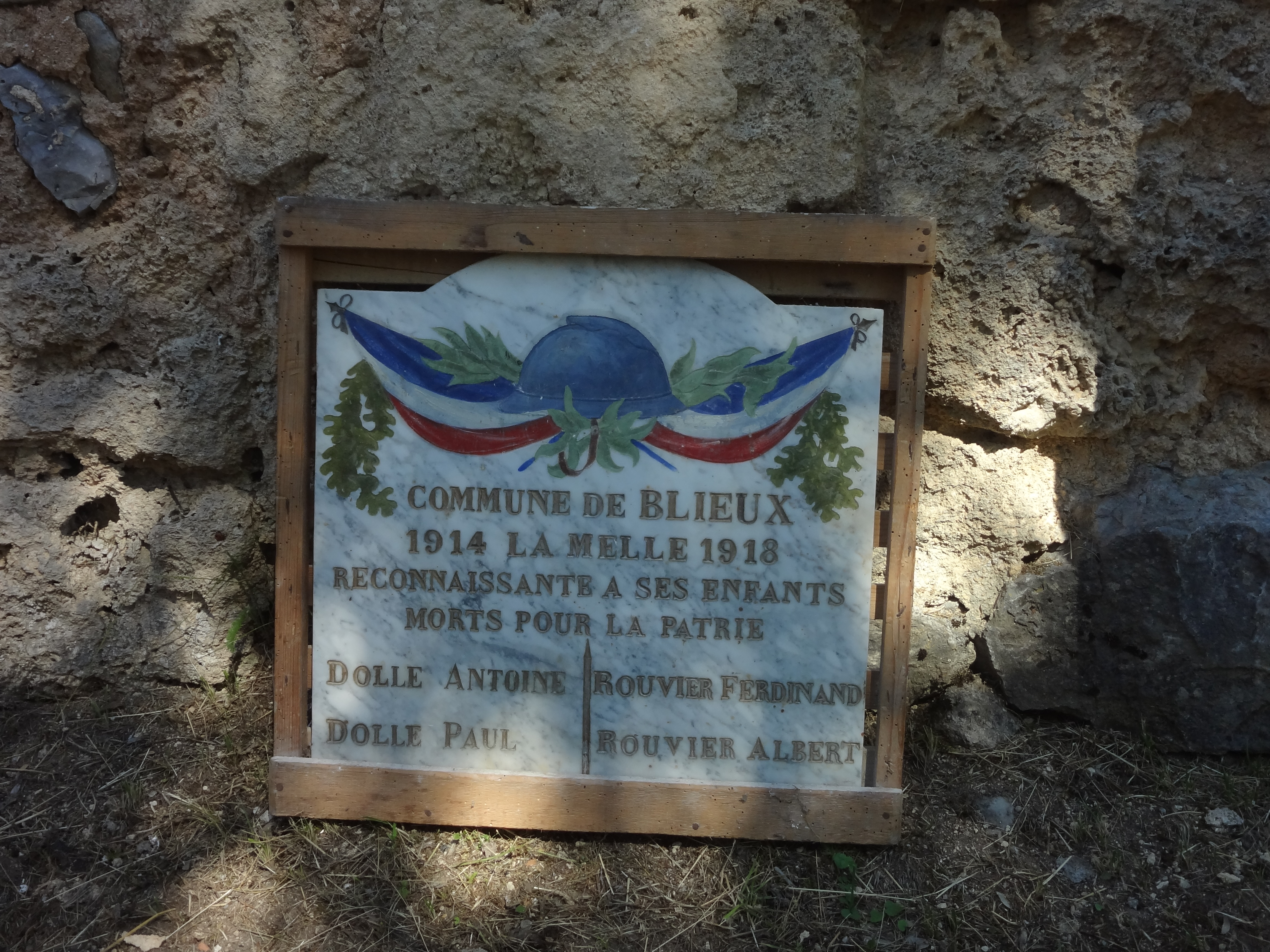 Téléchargée avec Commonist 0.9.1 Plaque monument aux morts du hameau de La Melle